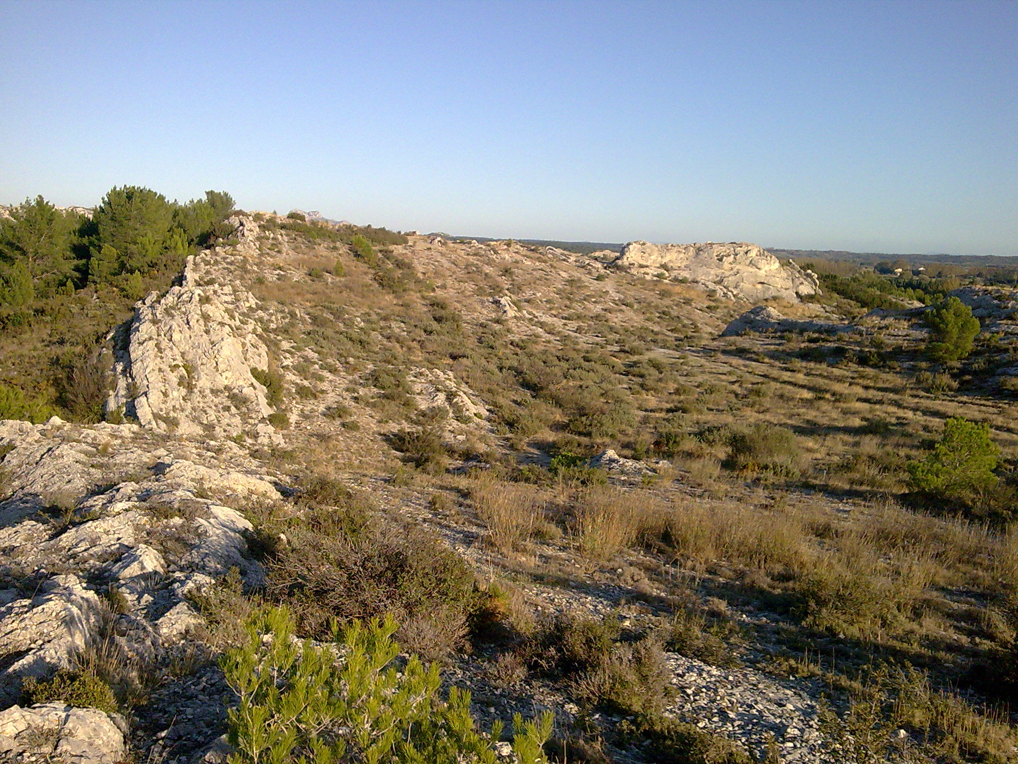 Chaîne de la Pène (Maussane-les-Alpilles). Vue depuis son sommet.